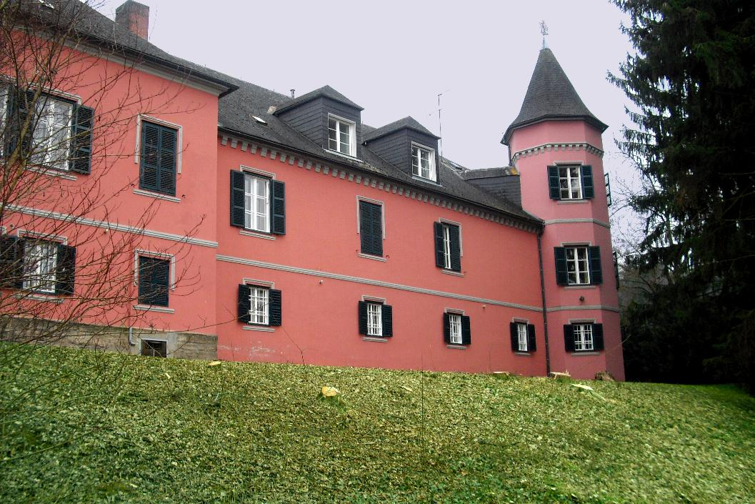 Schloss Stein bei Fehring